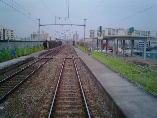 京釜線沙谷駅